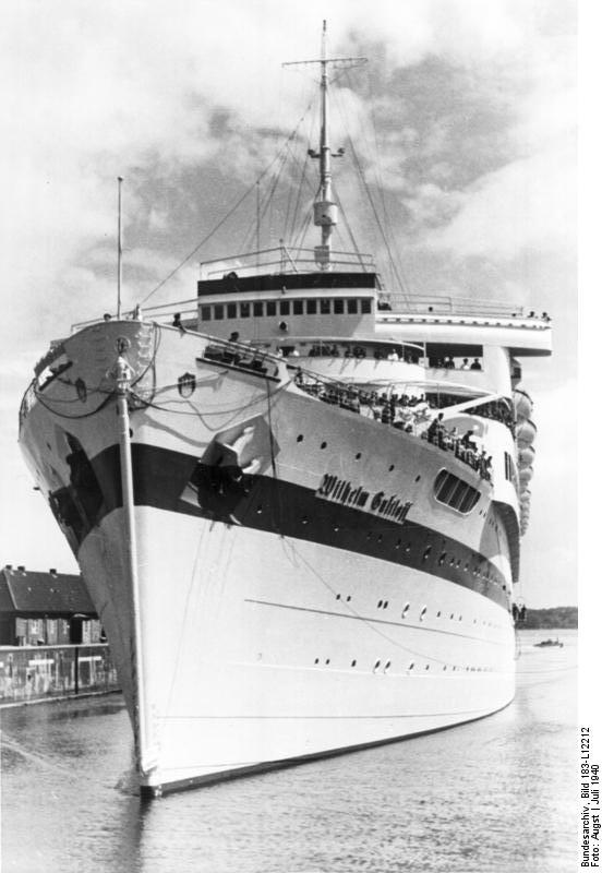 Aktion in Norwegen: Lazarettschiff "Wilhelm Gustloff" bringt verwundete Narvik-Kämpfer nach der Heimat.